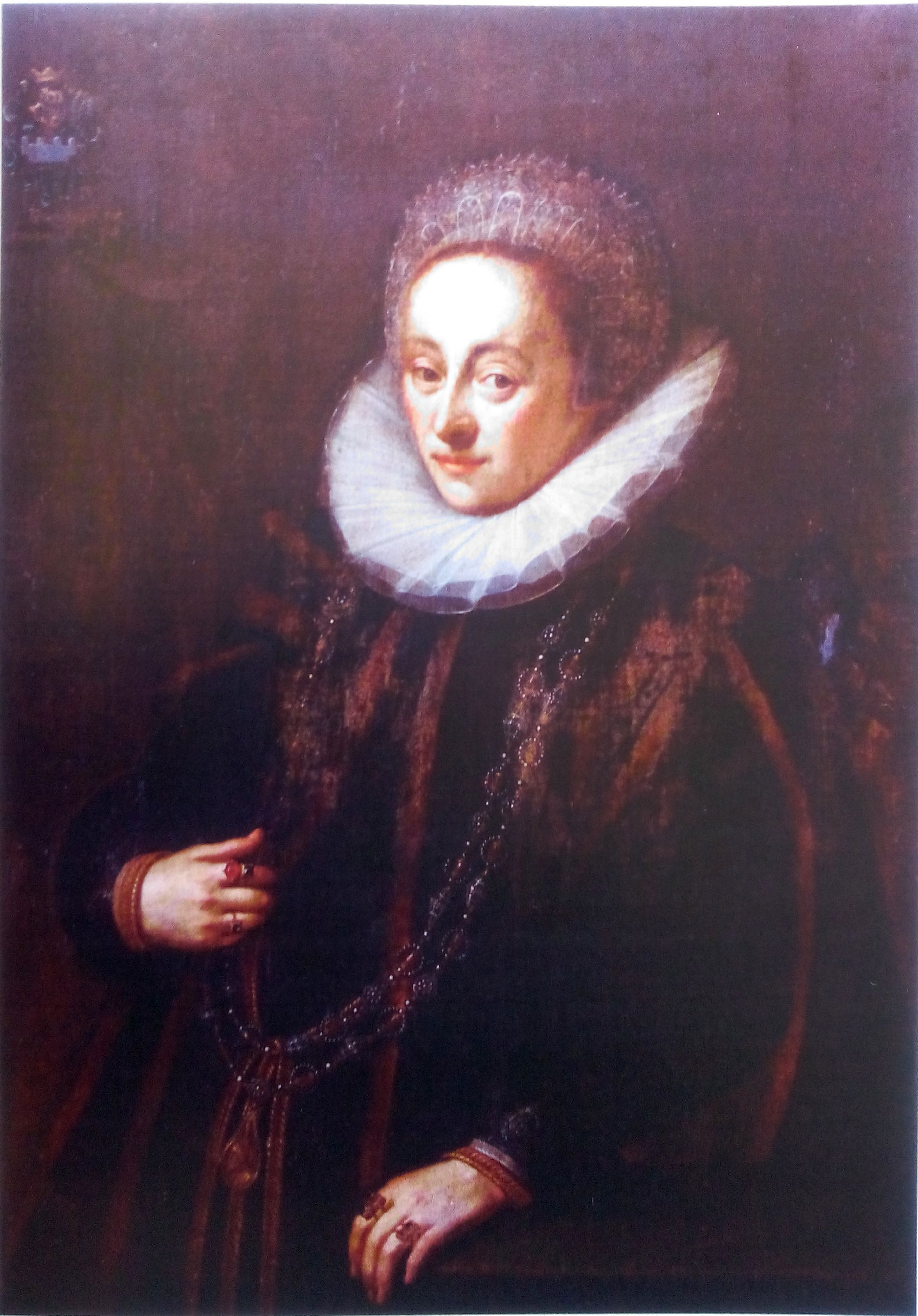 Catherine Kannengiesser